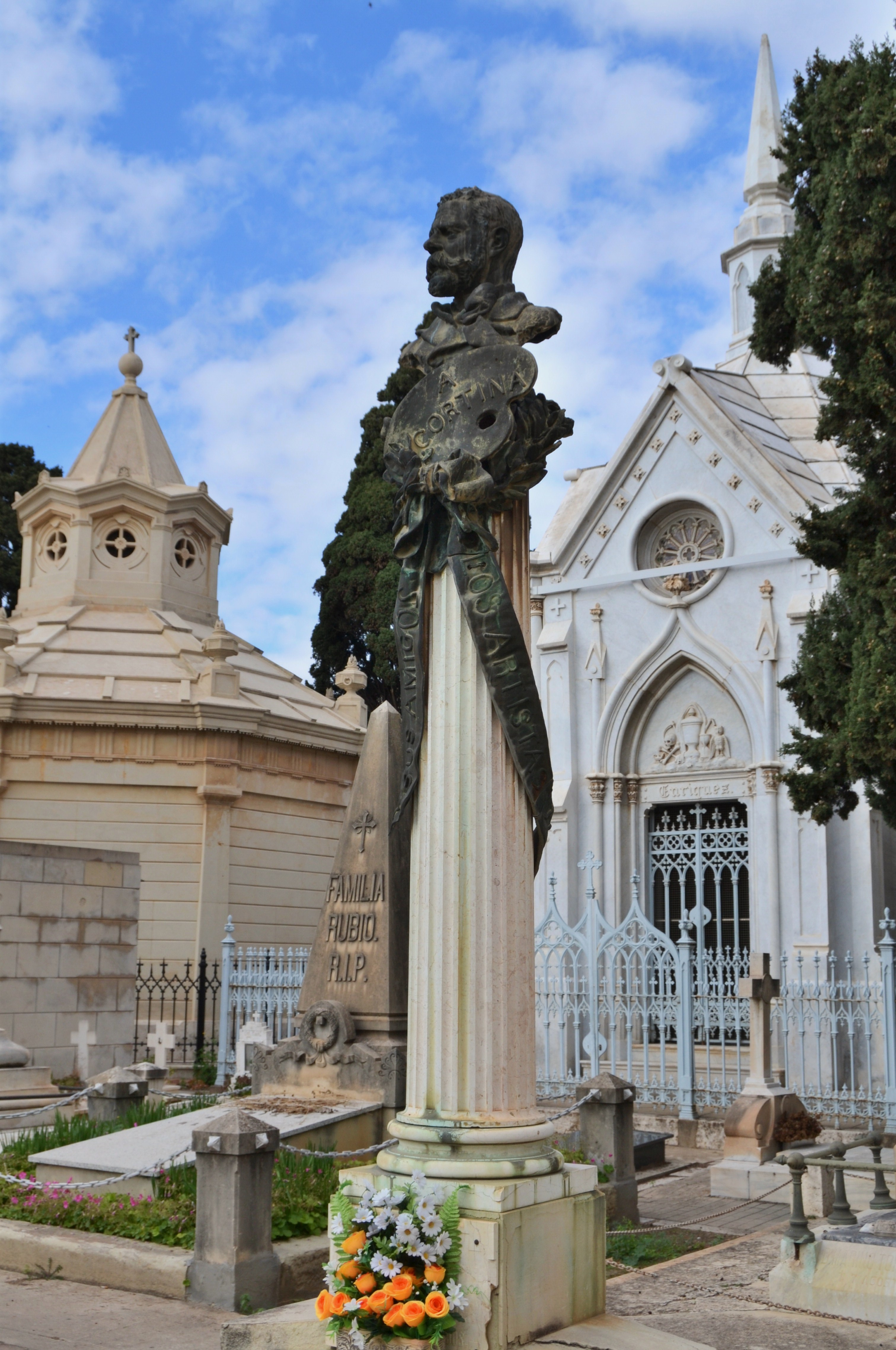 Tomba del pintor Antonio Cortina, cementeri general de València.